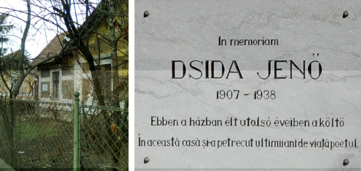 Dsida Jenő emléktáblája utolsó lakhelyén Kolozsvárott (Fürdő utca 28.)